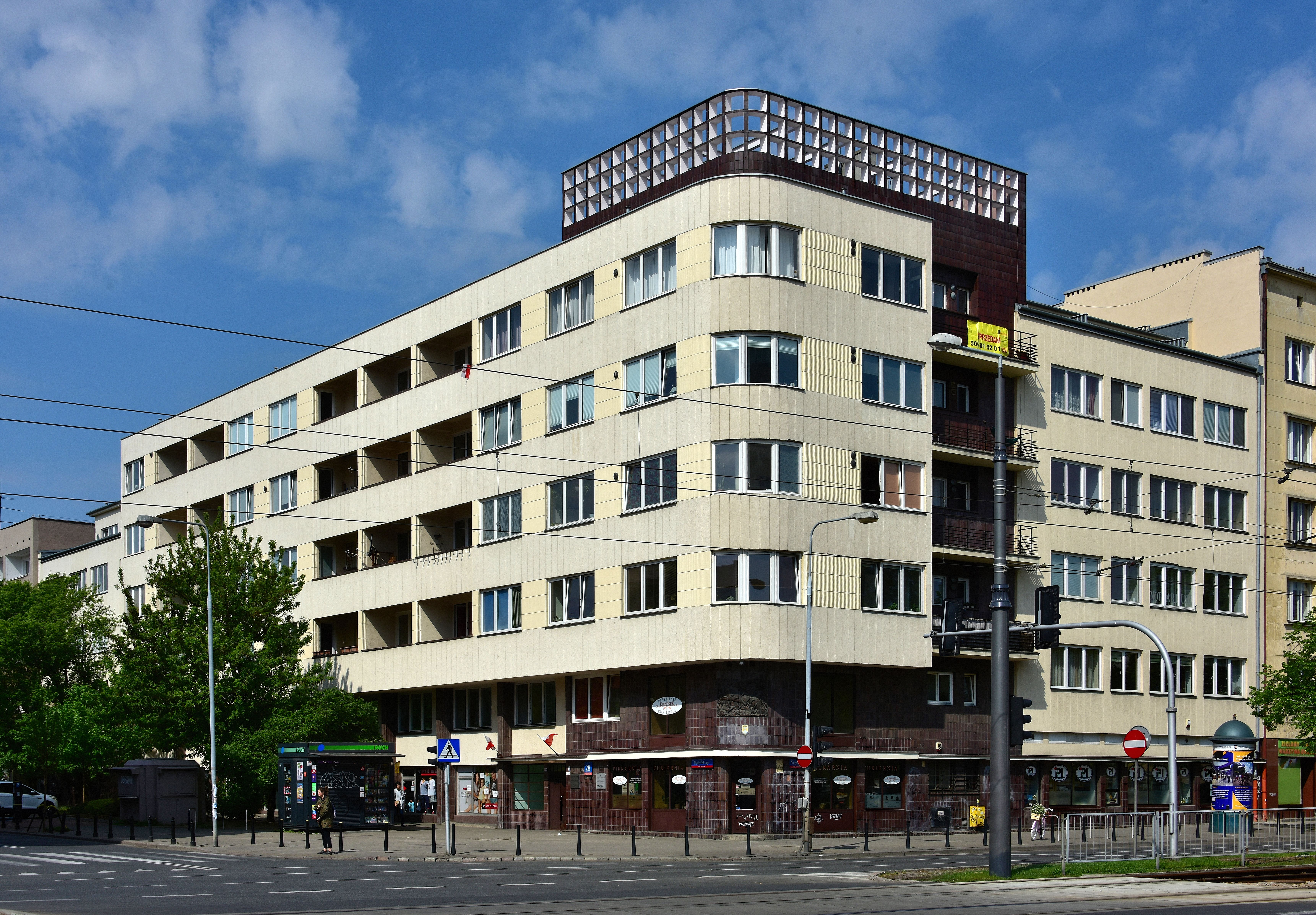 Dom Wedla przy ul. Puławskiej 28 w Warszawie